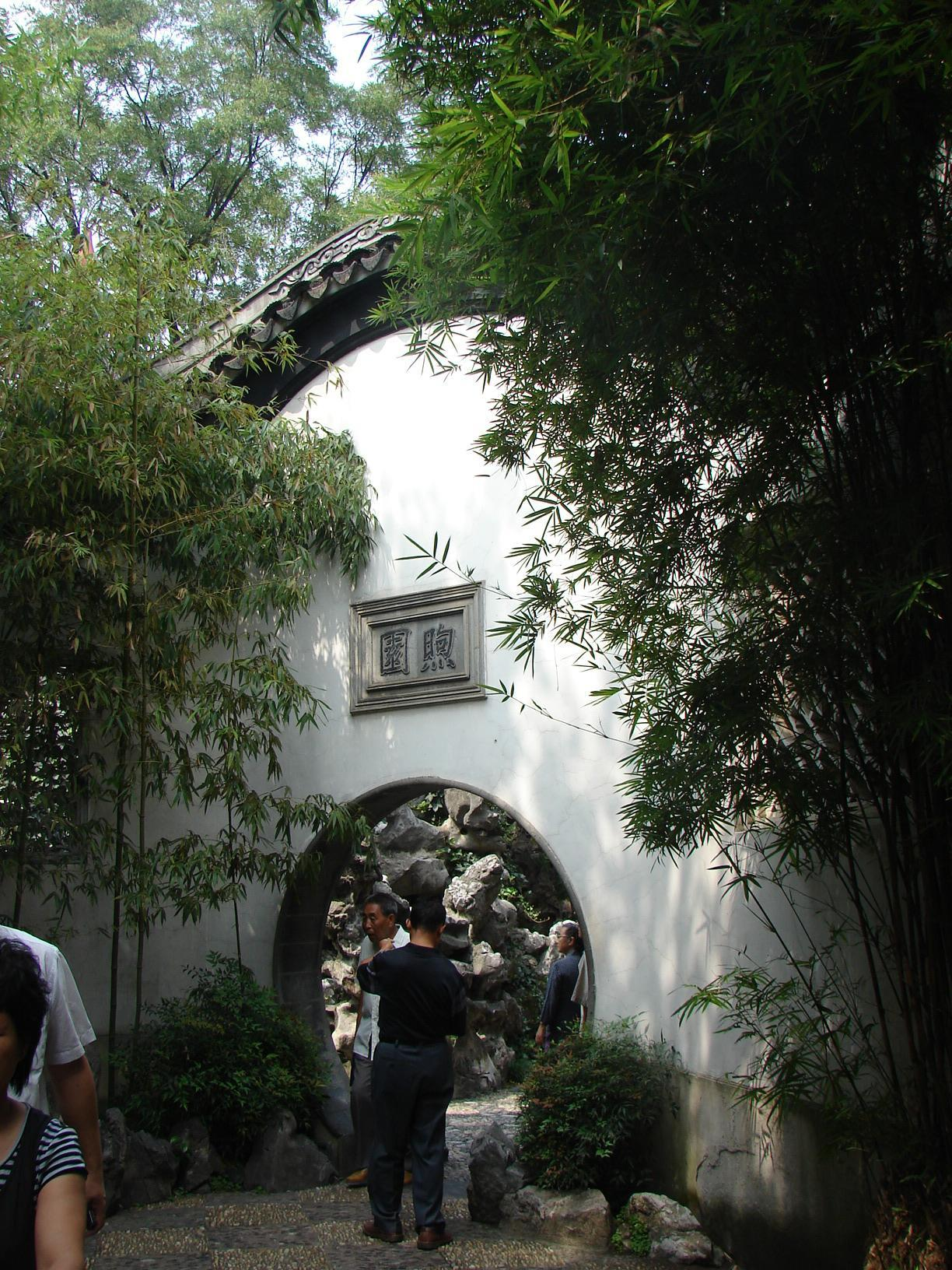 南京总统府西花园——熙园